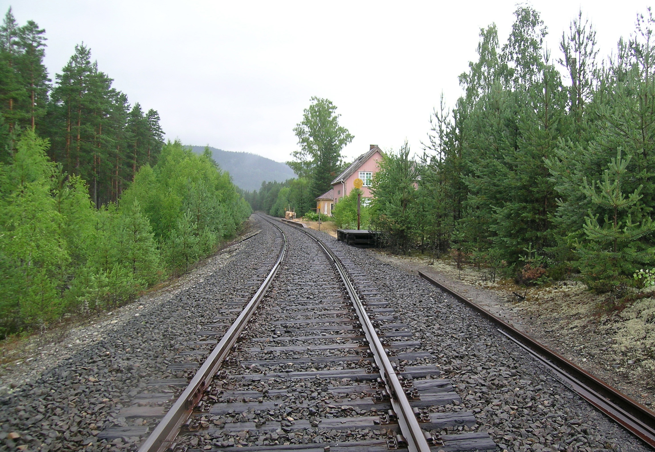 Numedalsbanen. Pikerfoss, Kongsberg